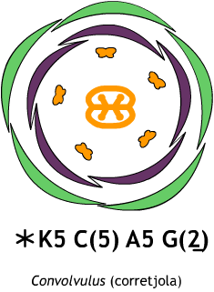 Diagrama floral de Convolvulus (corretjola).